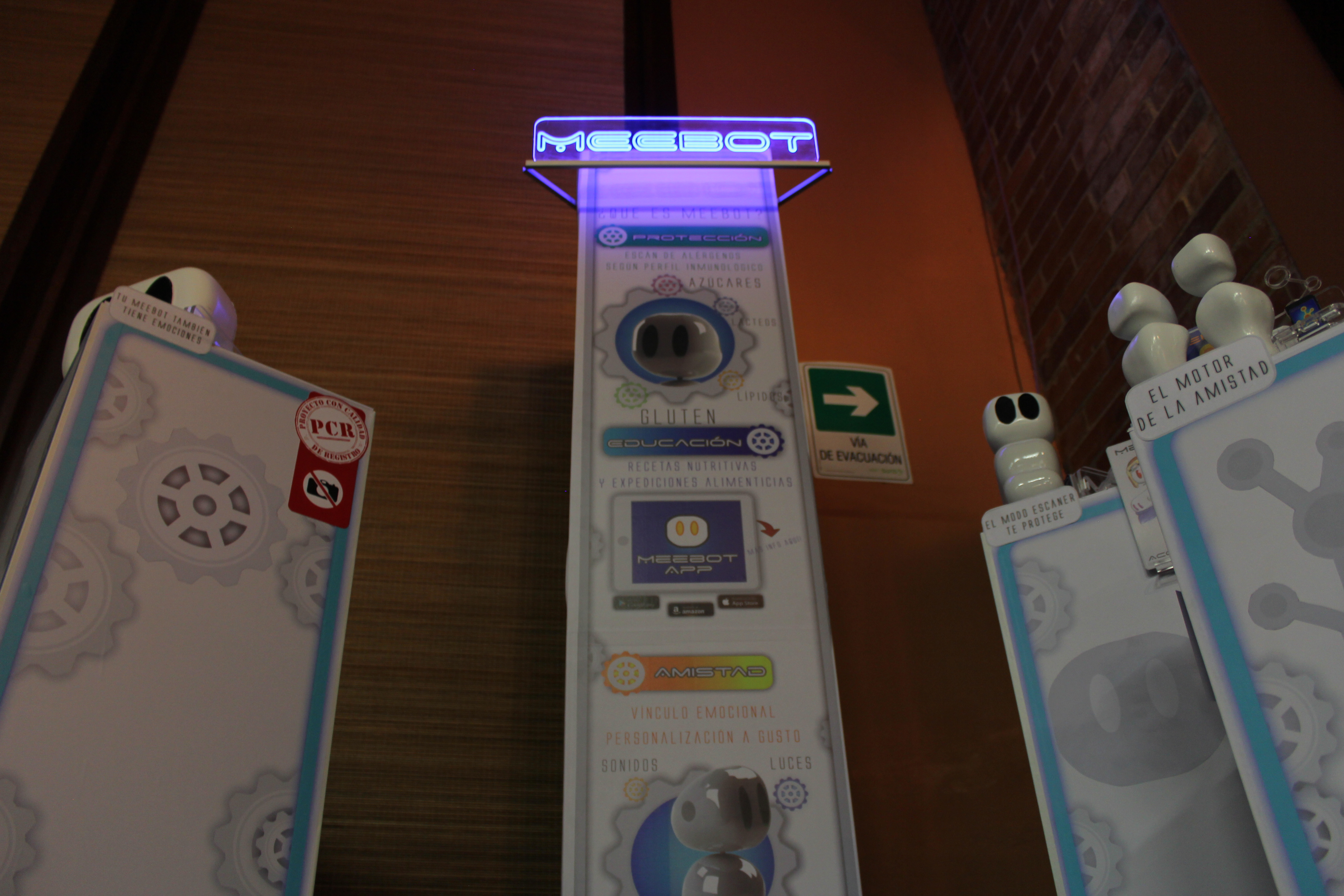 Proyecto de los estudiantes de FaDIC durante el 9no Salón Académico de Diseño